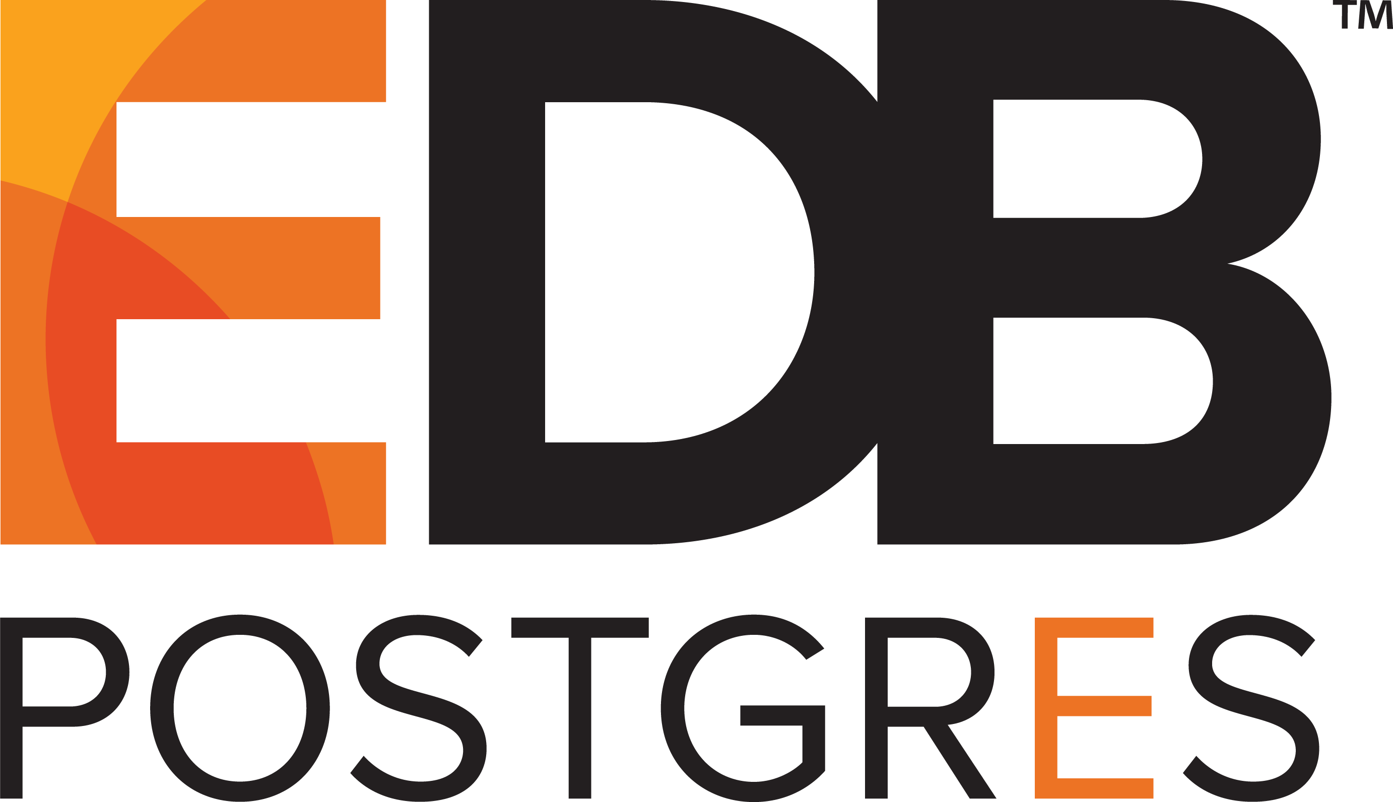 This file contains the corporate logo for Enterprise Corporation and is used as a visual representation for the company's brand.